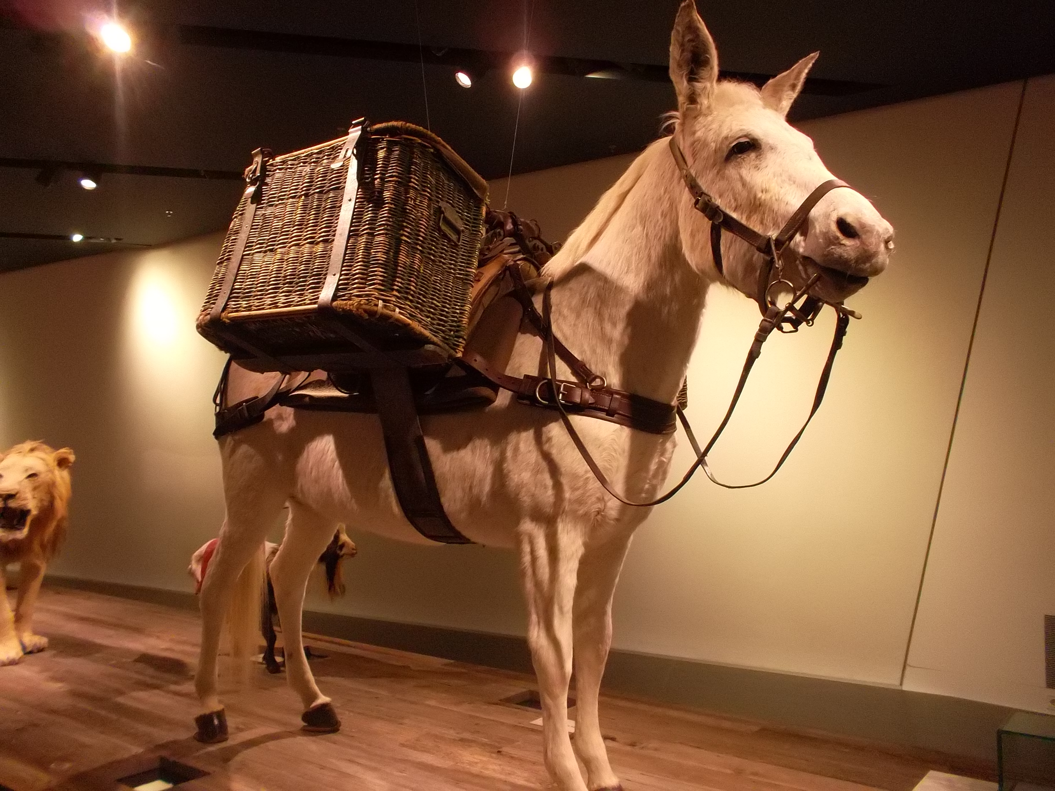 Ausstellungsstück Lastesel im Militäreinsatz